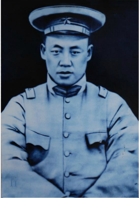 中文（台灣）: 李鏡清（1872年－1912年7月6日），清末、中華民國大陸時期政治人物。